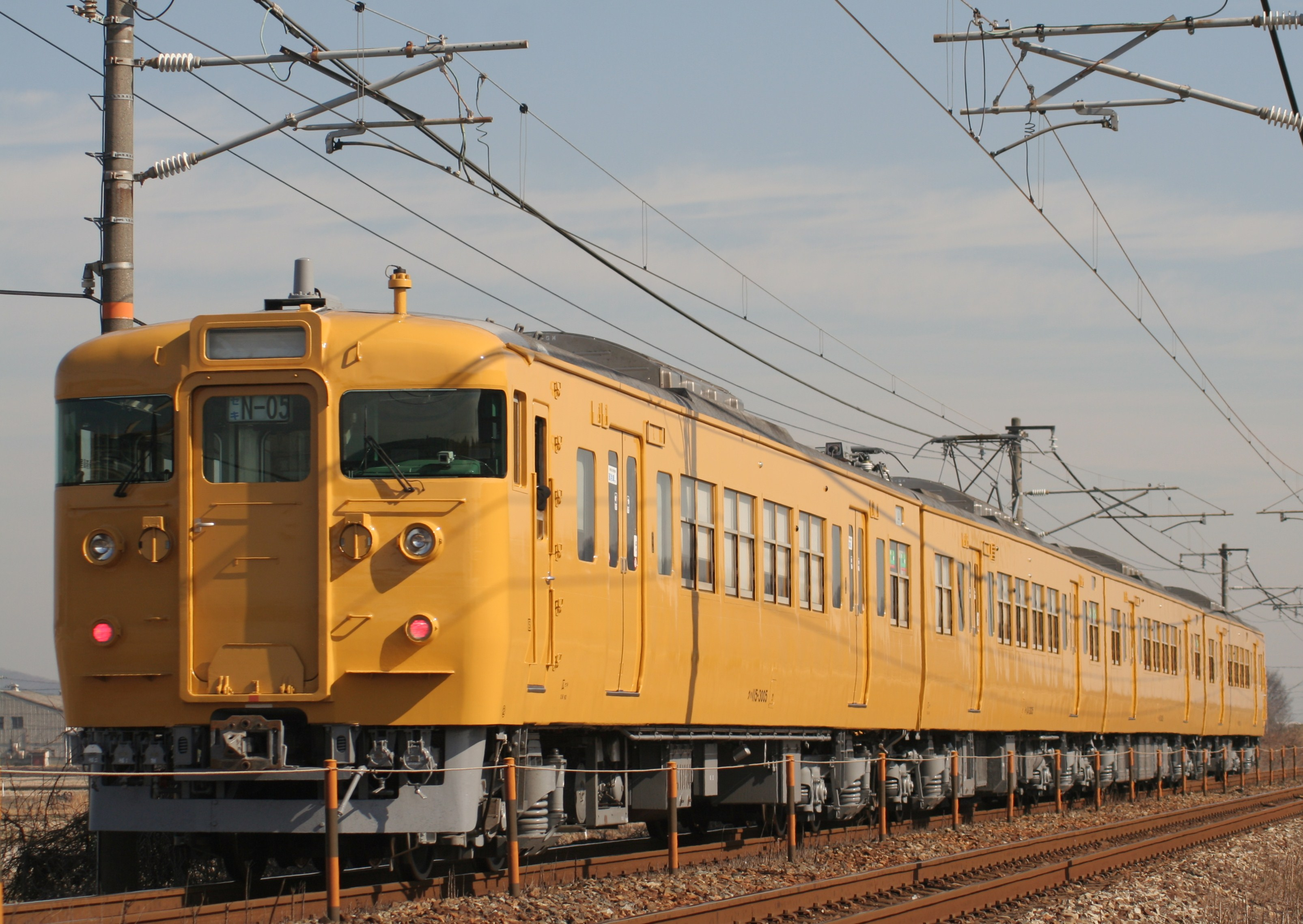 JR西日本115系電車 下関地域鉄道部所属 N5編成（中国地方新塗色？黄色一色）山陽本線、中庄・庭瀬間にて